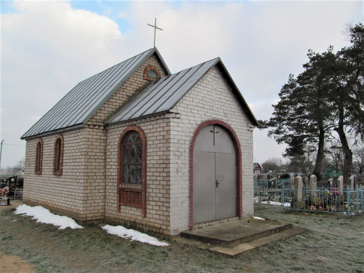 Ленькі. Могілкі. Каплічка